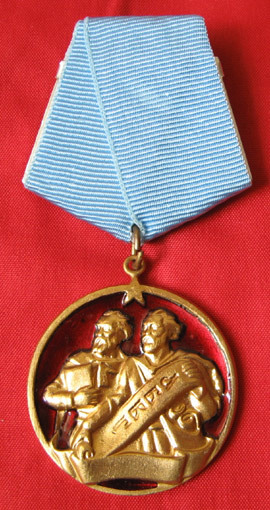 орден „Кирил и Методий“ I ст.